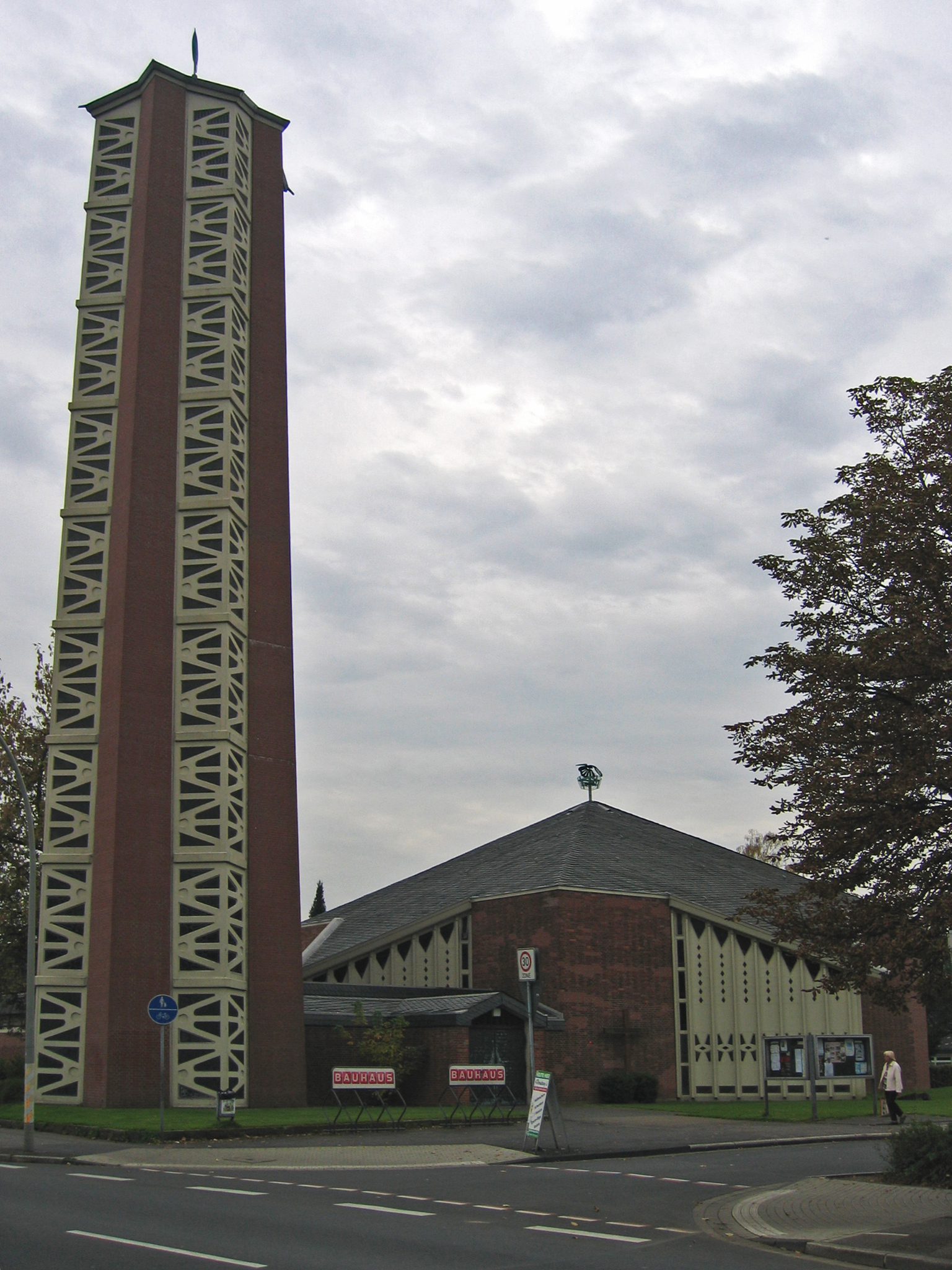 Kirche im Ortskern von Alkenrath